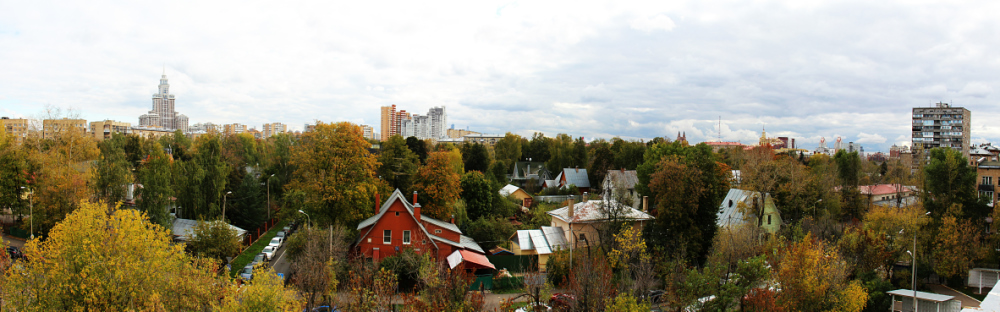 Поселок Сокол